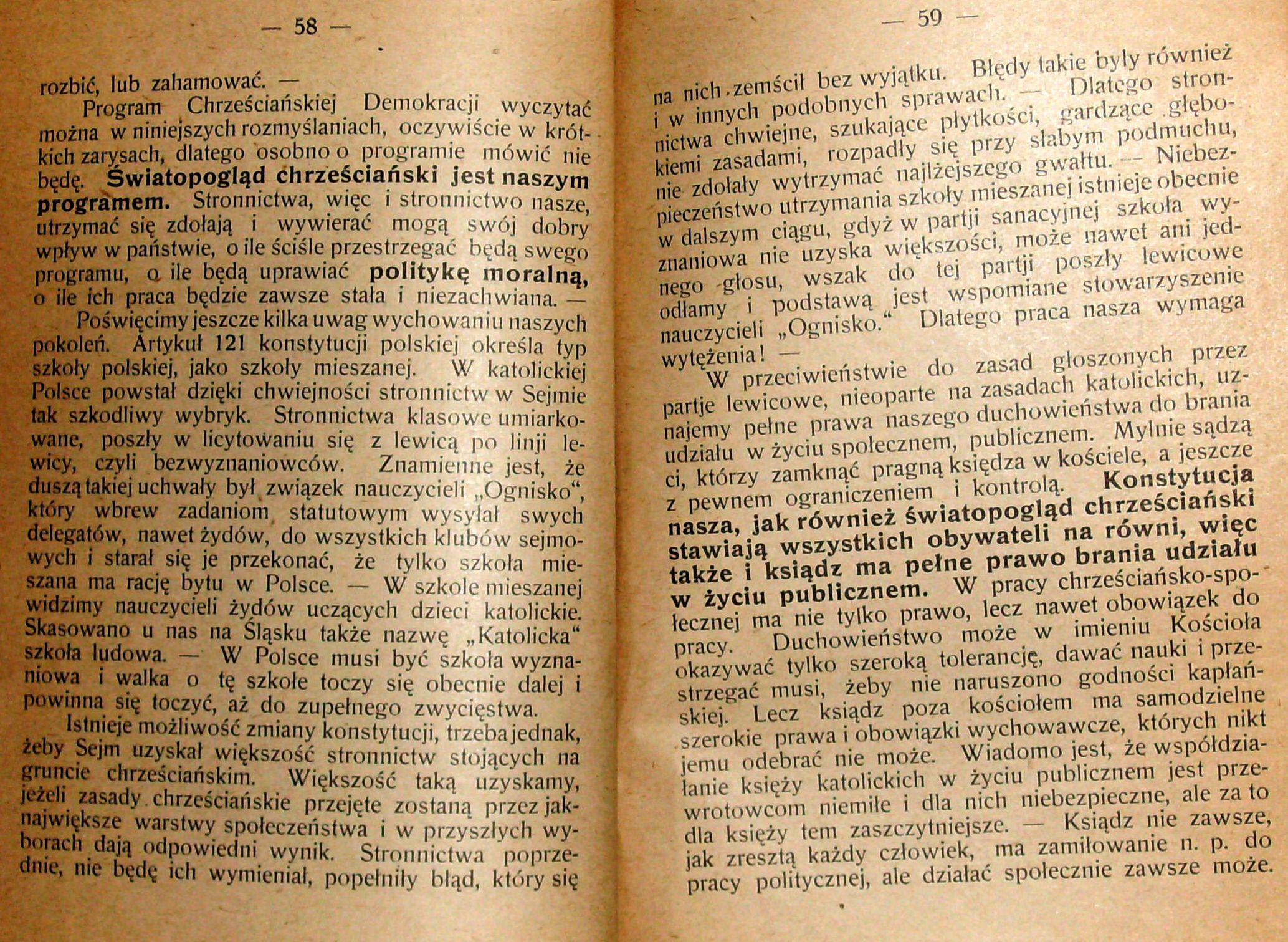 Stanisław Krzyżowski, Rozmyślania w czterdziestą rocznicę encykliki „Rerum novarum”, wydanej 15 maja 1891 r. przez papieża Leona XIII, Pszczyna 1931